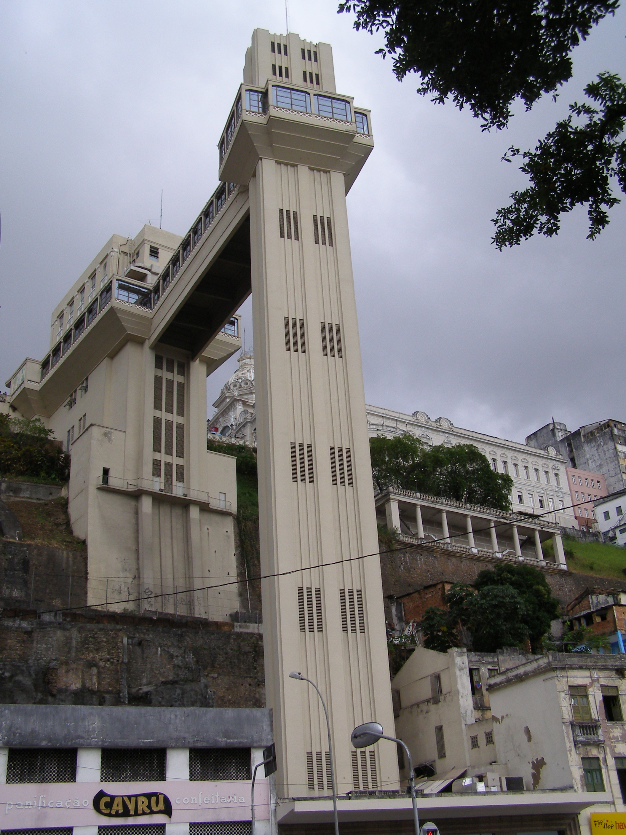 Foto do Elevador Lacerda, Salvador, Bahia.